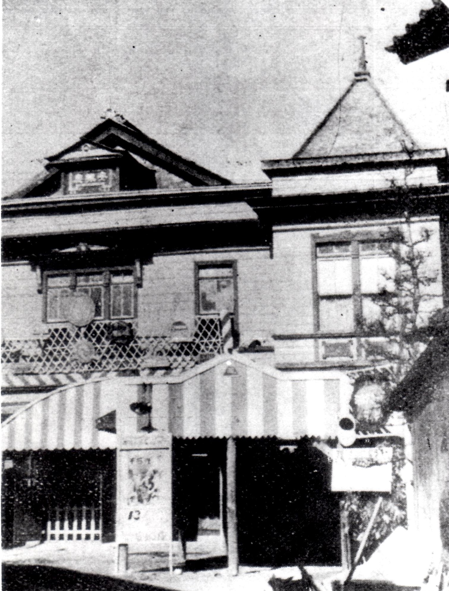 愛知県安城市・安城座 1950年頃